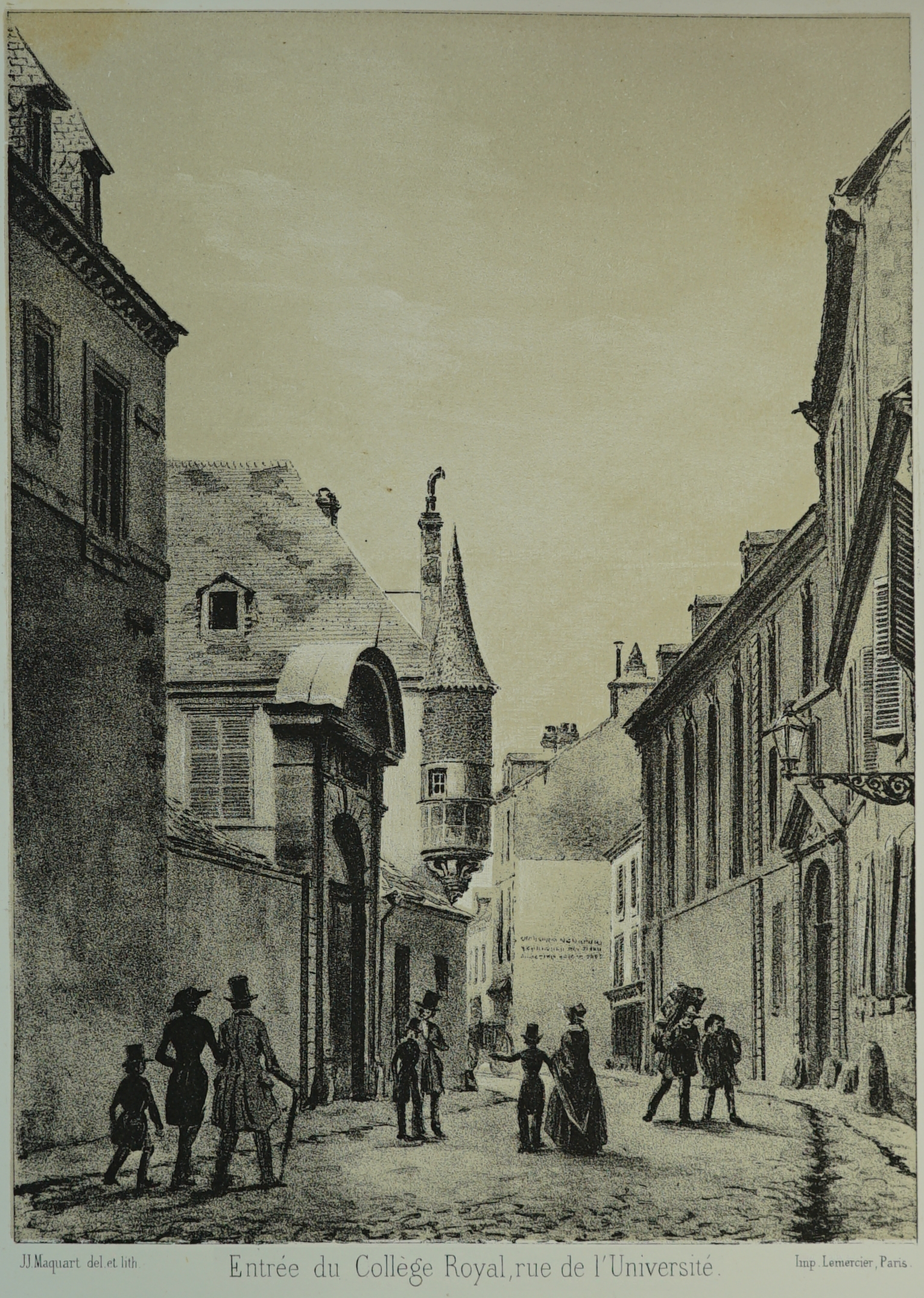 dessin du collège royal actuelement Lycée Université par Maquart.